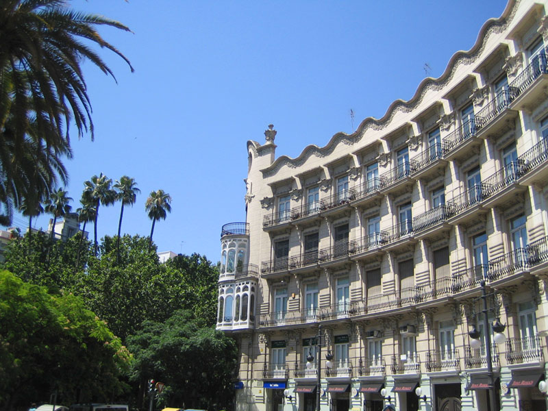 Cases Xapa, Plaça de Cánovas de Castillo, València. Casas Chapa, Cánovas de Castillo square, Valencia, Spain.